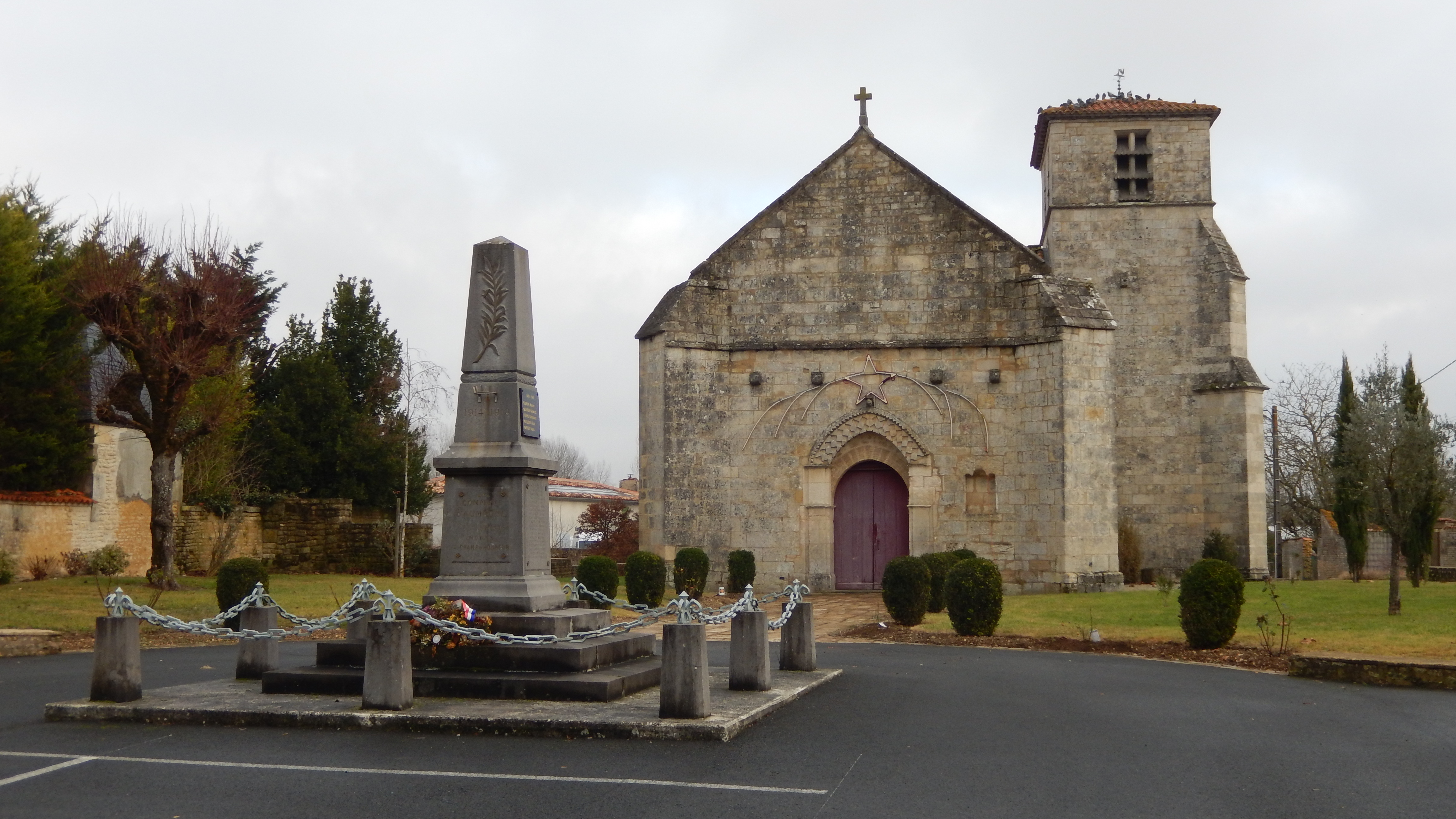 Le monument aux morts et l'église Saint-Pierre, au bord de la Place de l'Église et du 19 Mars 1962, à Aumagne, en Charente-Maritime.